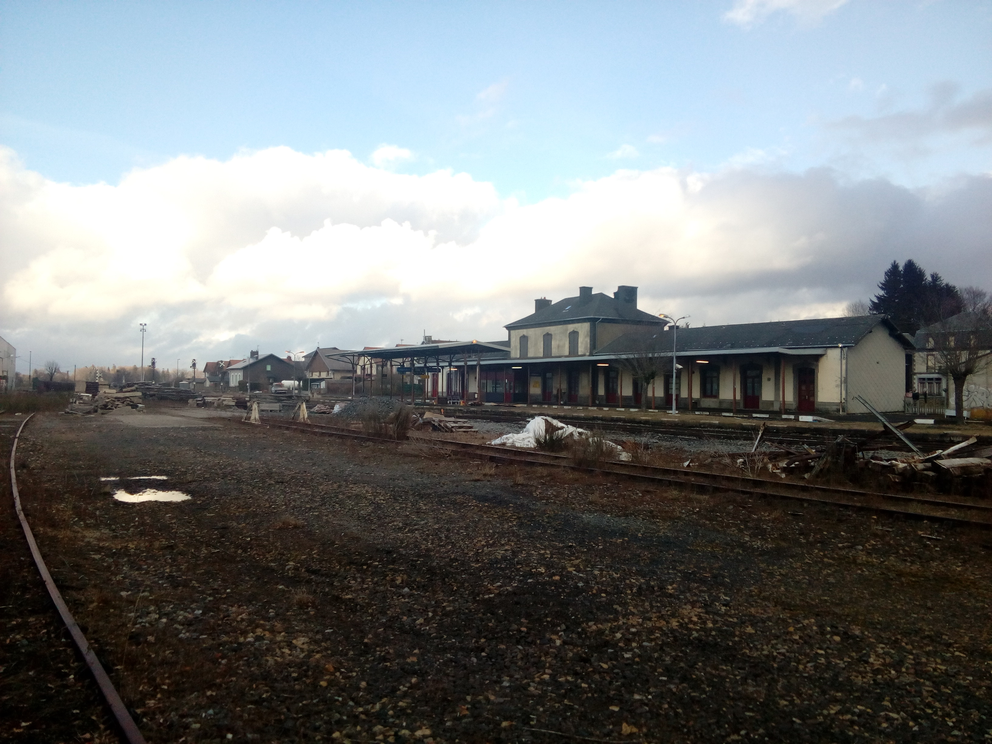 ancien bâtiment de voyageur côté voies